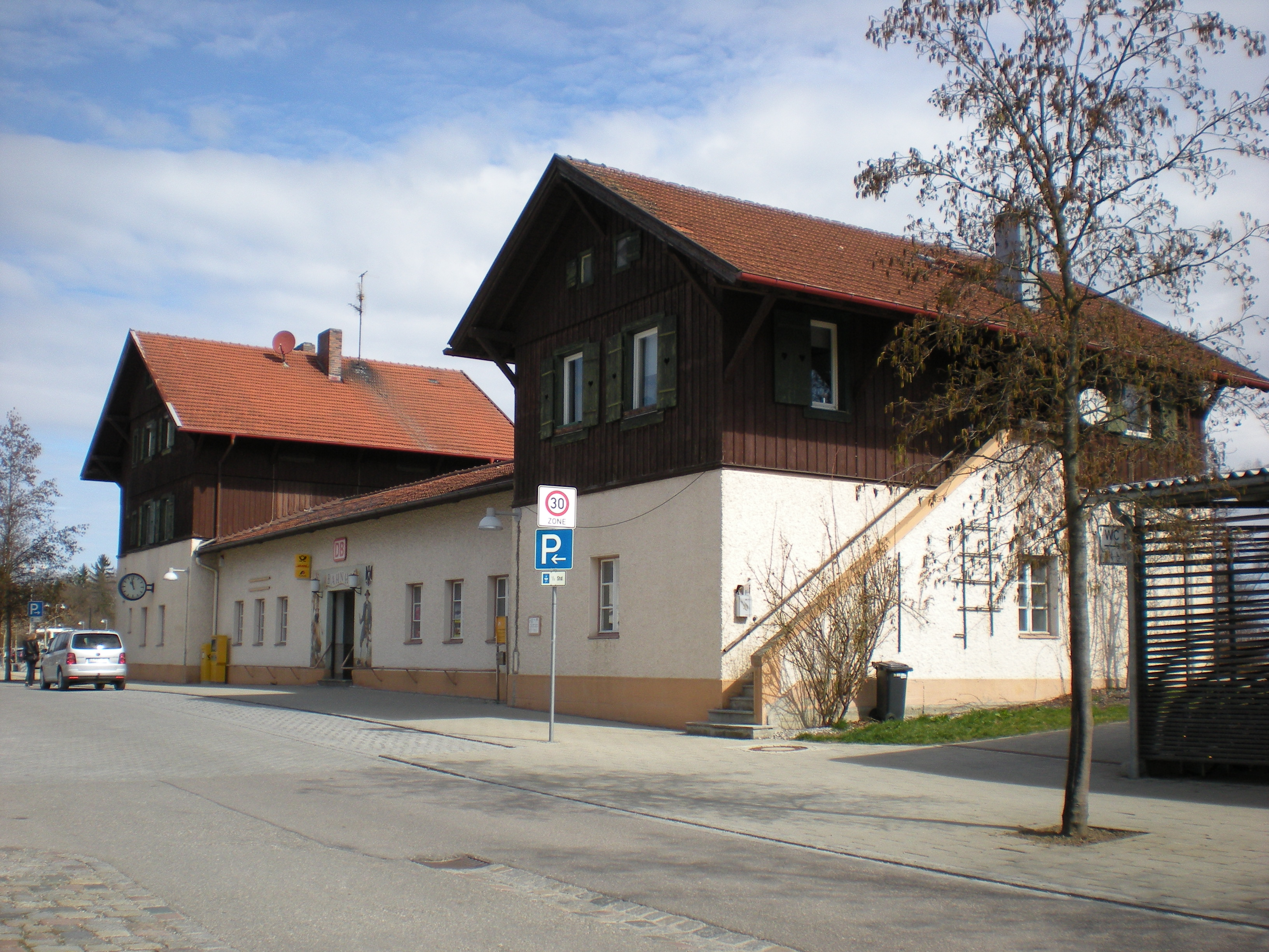 denkmalgeschütztes Empfangsgebäude des Bahnhofs Dießen von der Straßenseite